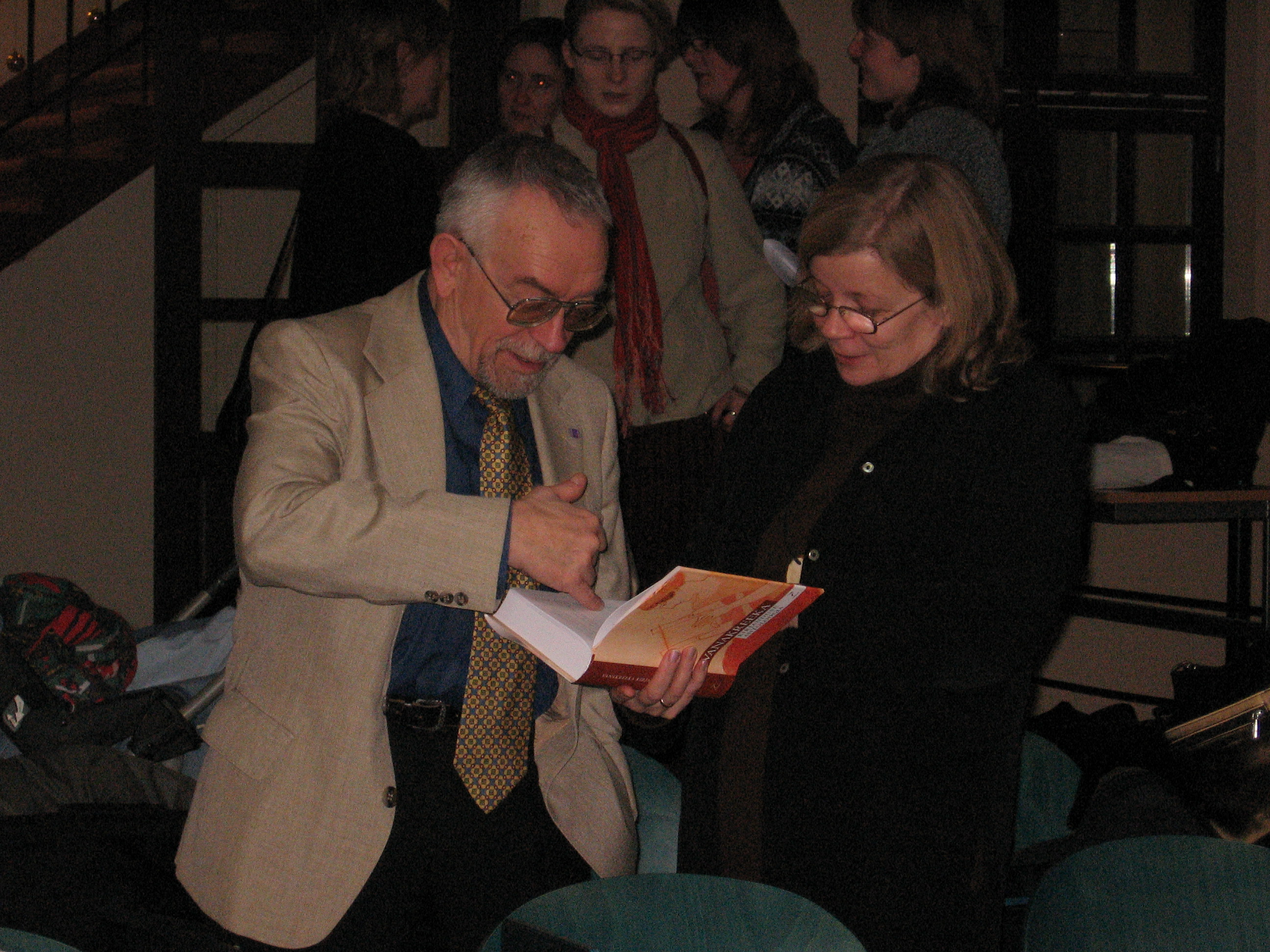 Kalle Kasemaa ja Kersti Unt "Vanakreeka kirjanduse antoloogia" esitlusel 19.01.2007 Tartus, Ülikooli 17 fuajees